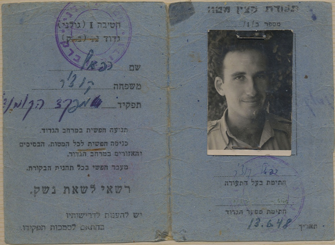 רפי קוצר לוחם בהגנה הקים במלחמת העצמאות את גדוד הקומנדו של חטיבת גולני תעודת מפקד הקומנדו